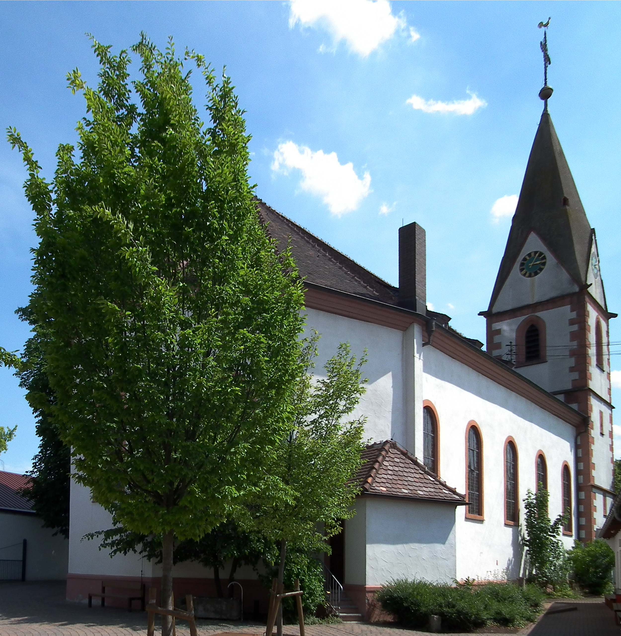 Evangelische Paul-Gerhardt-Kirche in Ludwigshafen-Rheingönheim (Rheinland-Pfalz, Deutschland)